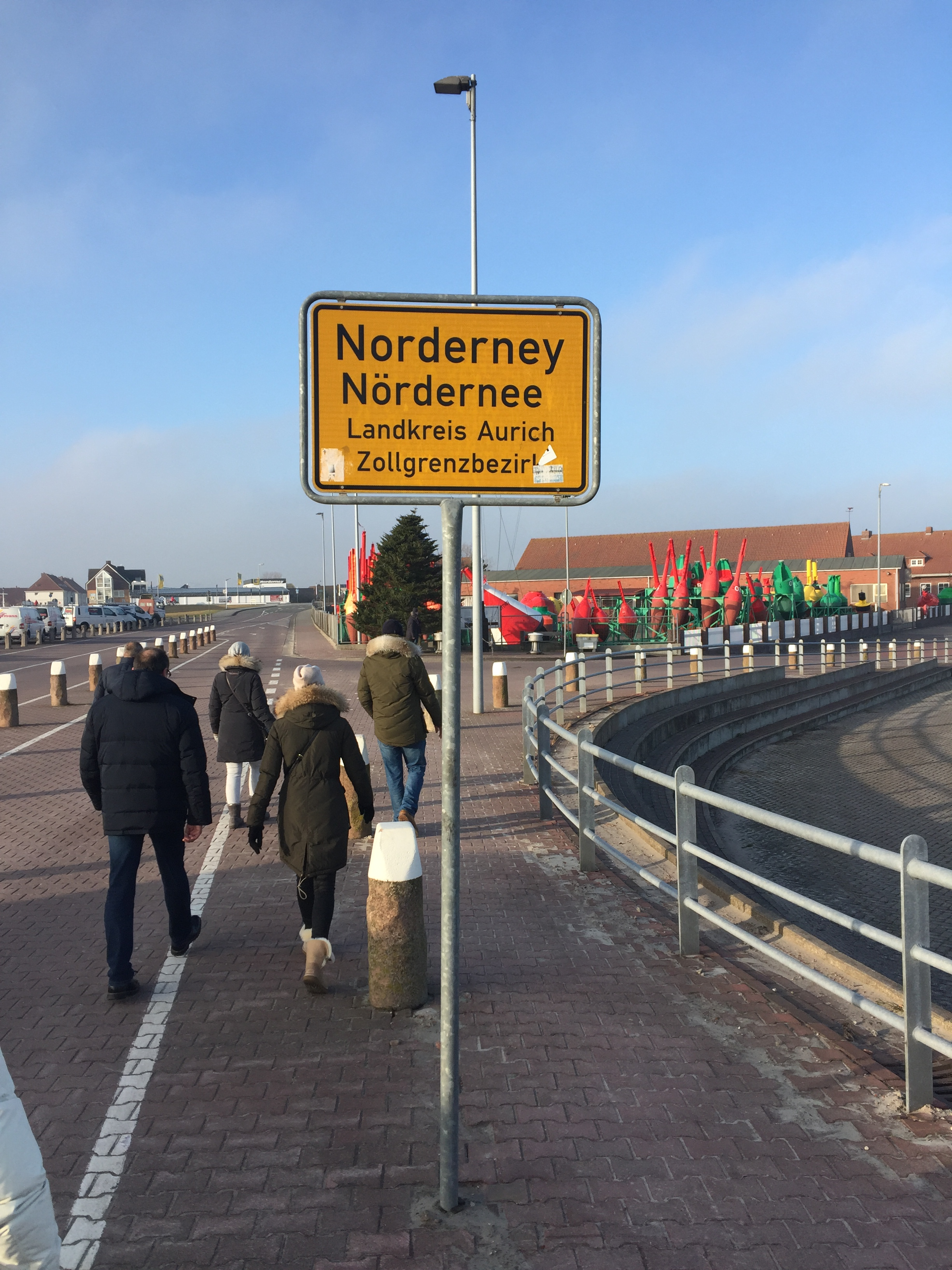 Ortsschild Norderney/Nördernee(2009-2012 endete die plattdeutsche Schreibweise auf "eei")